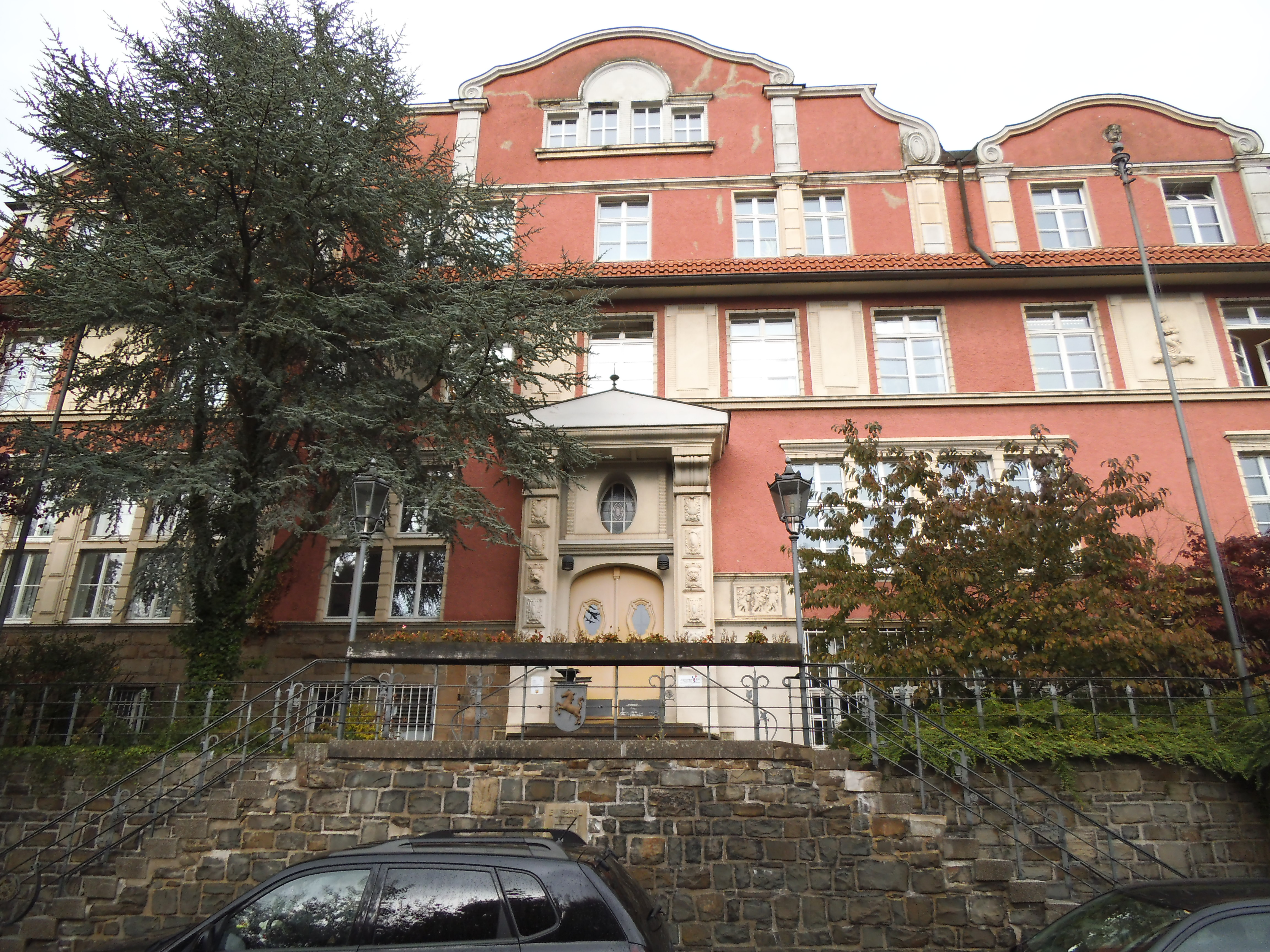 Altes Rathaus Ennepetal am 9. Oktober 2013